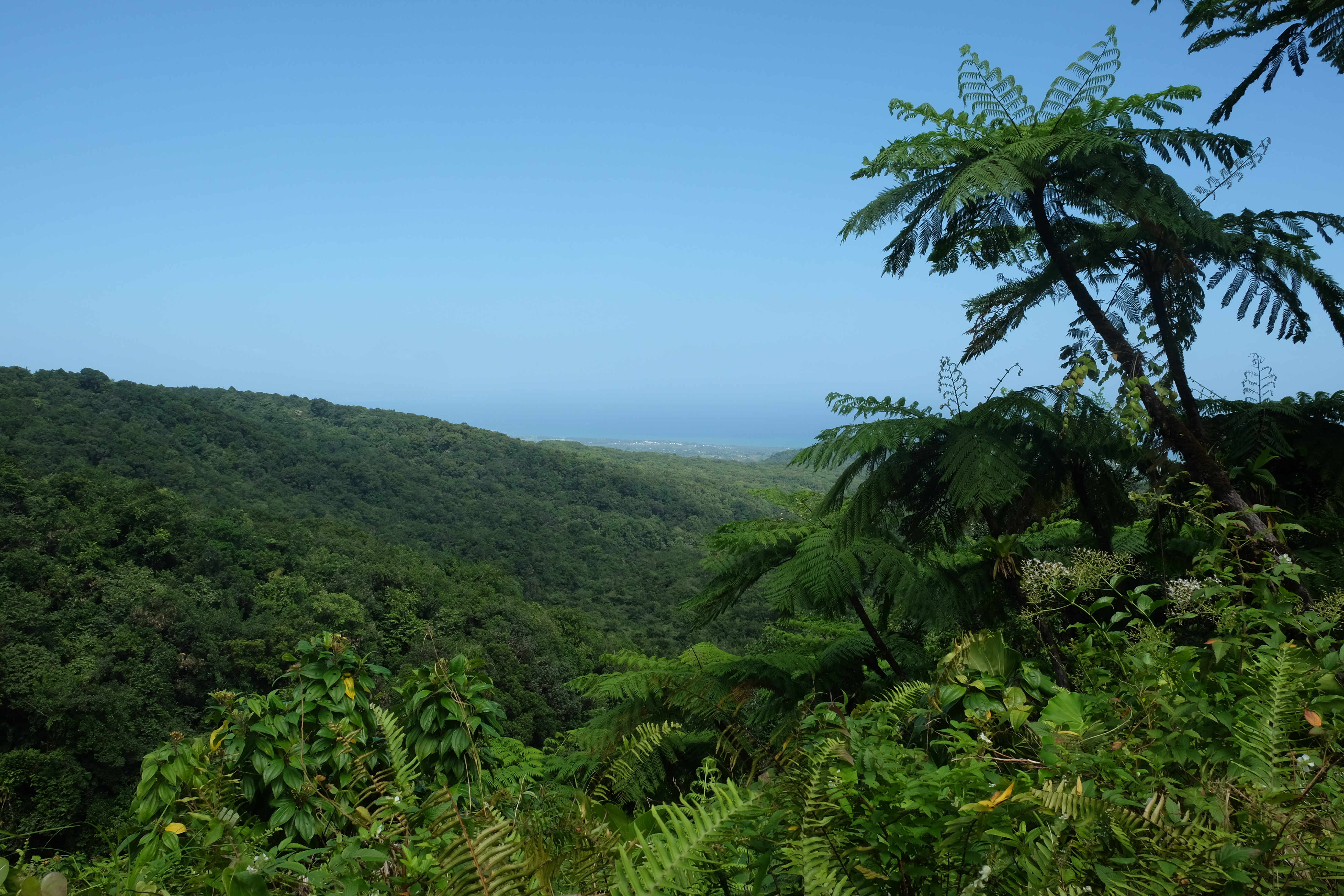 Panorama sur la forêt et le Petit Cul-de-sac Marin et au départ du sentier des chutes du Carbet dans le Parc National de Guadeloupe. Au premier plan, des fougères arborescentes.